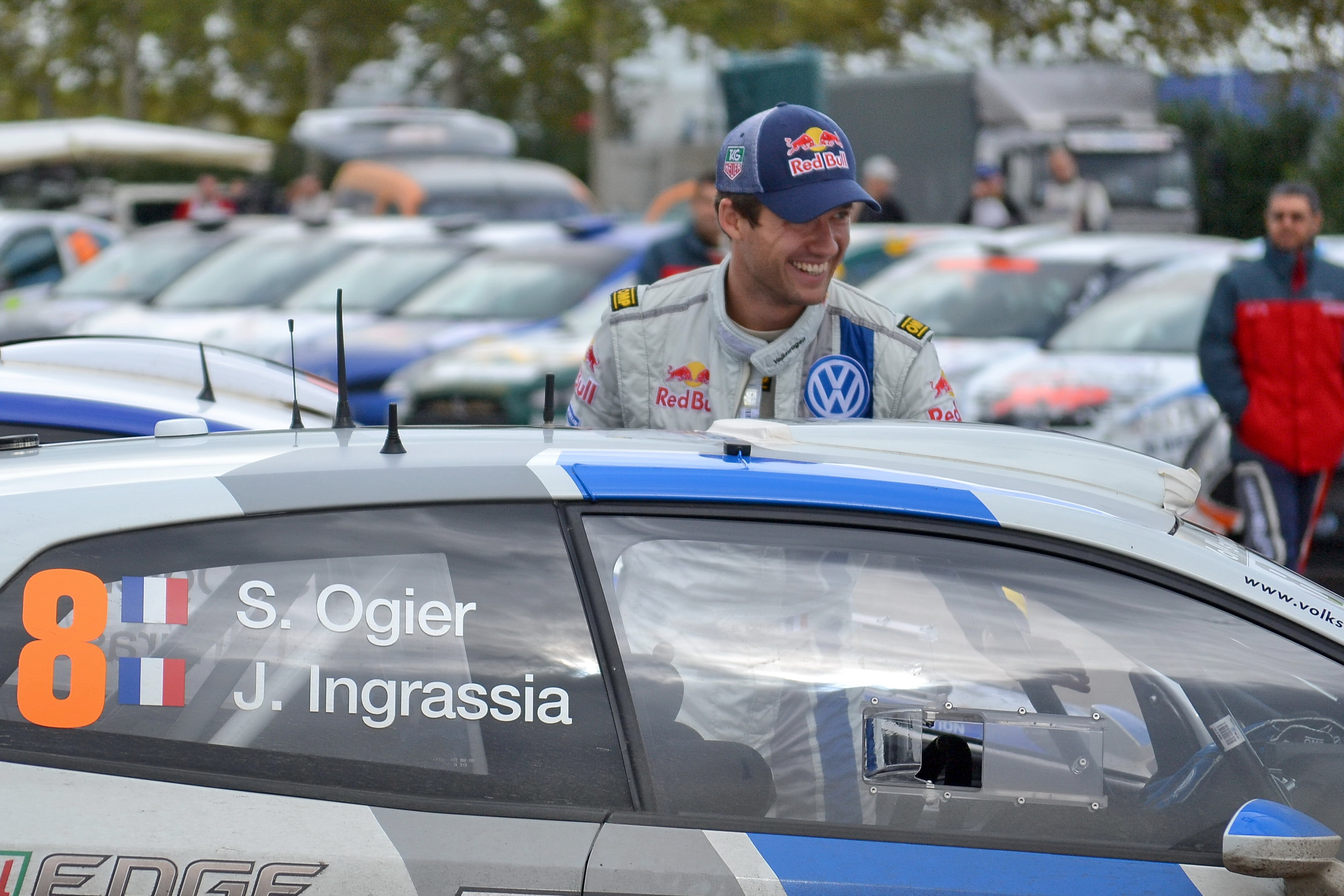 Sébastien Ogier au parc d'assistance de Colmar durant le Rallye de France-Alsace 2013.